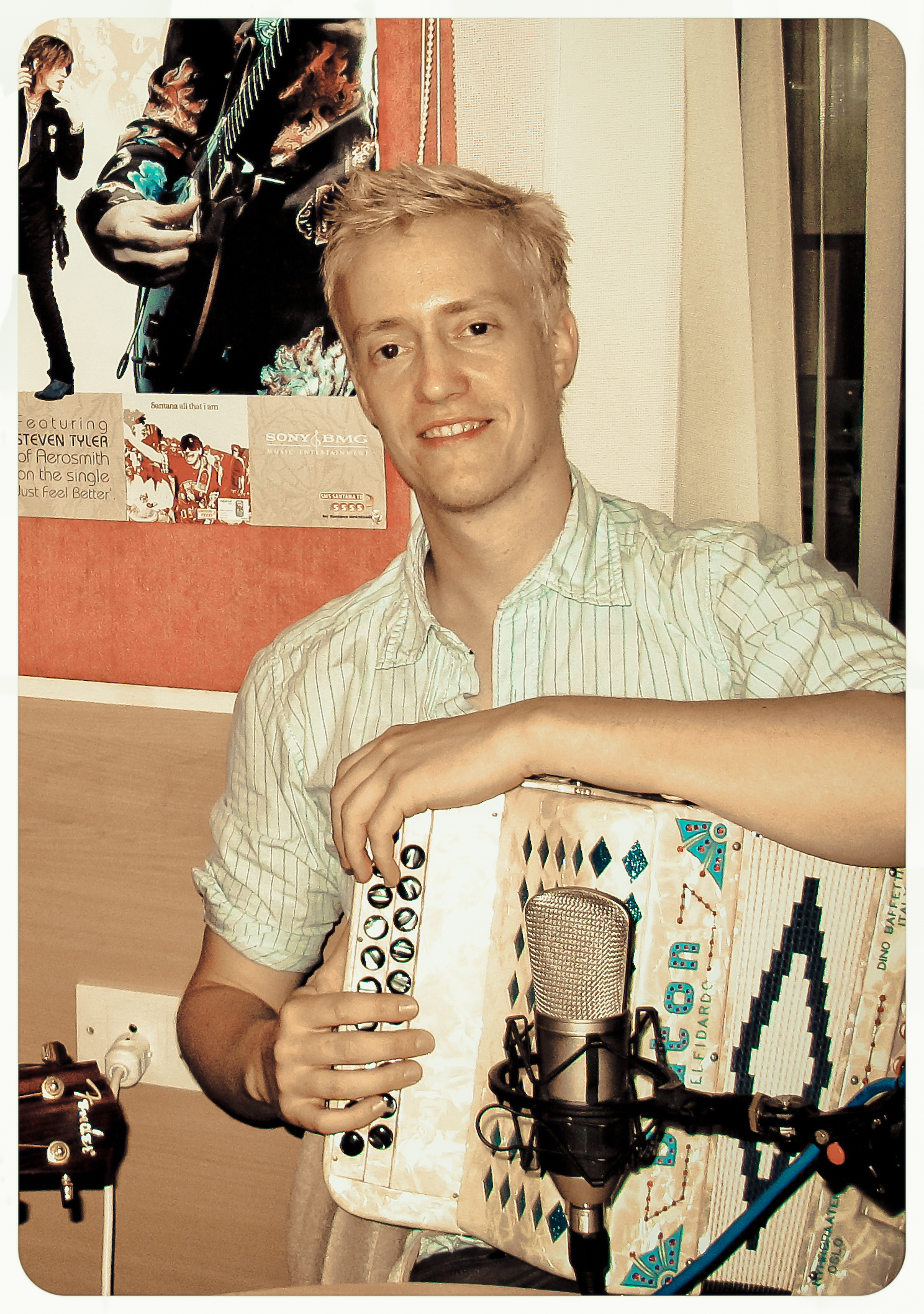 The swedish button box champion.